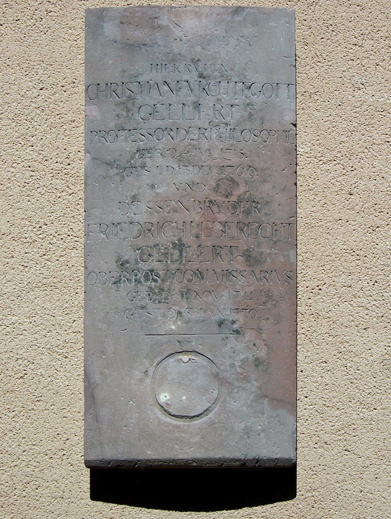 Grabplatte von Christian Fürchtegott Gellert und dessen Bruder Friedrich Leberecht Gellert an einer Wand im Hof des Grassimuseums Leipzig (bis 2009 auf dem Leipziger Südfriedhof, I. Abteilung).